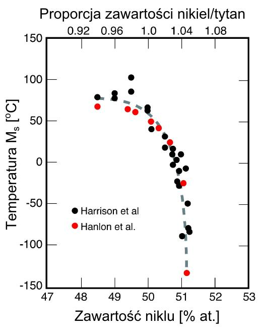 Wykres zależności temperatury Ms od zawartości niklu w nitinolu.